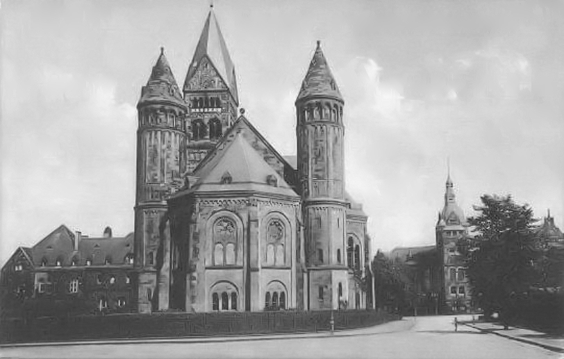 Erlöserkirche in Essen um 1910, rechts im Hintergrund ist das Gebäude des "Vereins für bergbauliche Interessen"